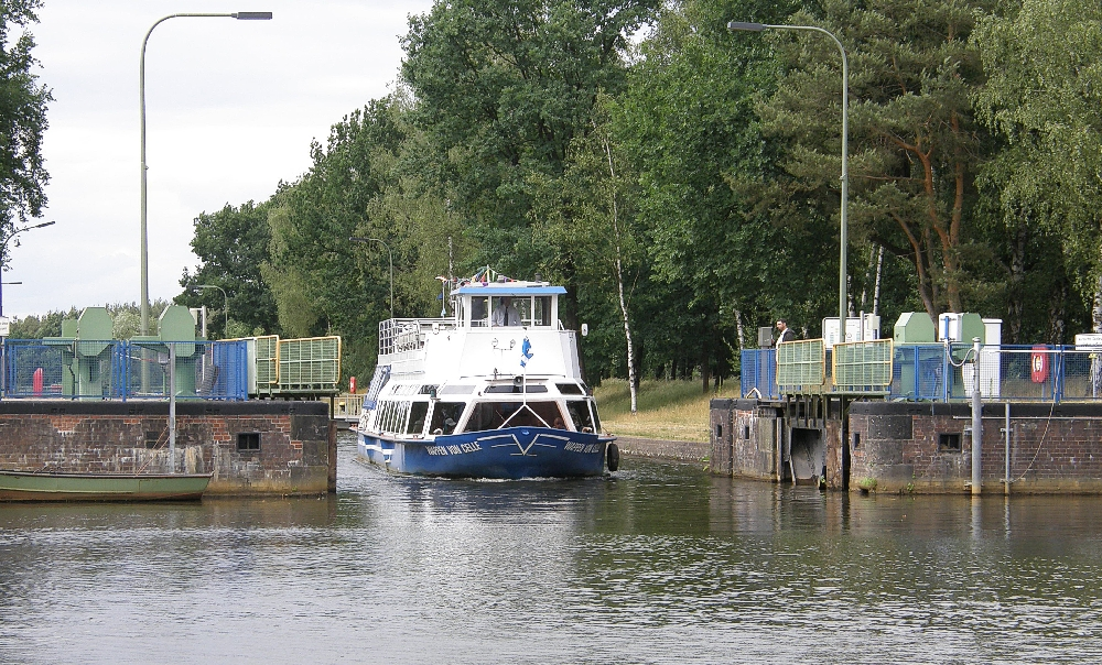 Die Wappen von Celle an der Allerschleuse Oldau